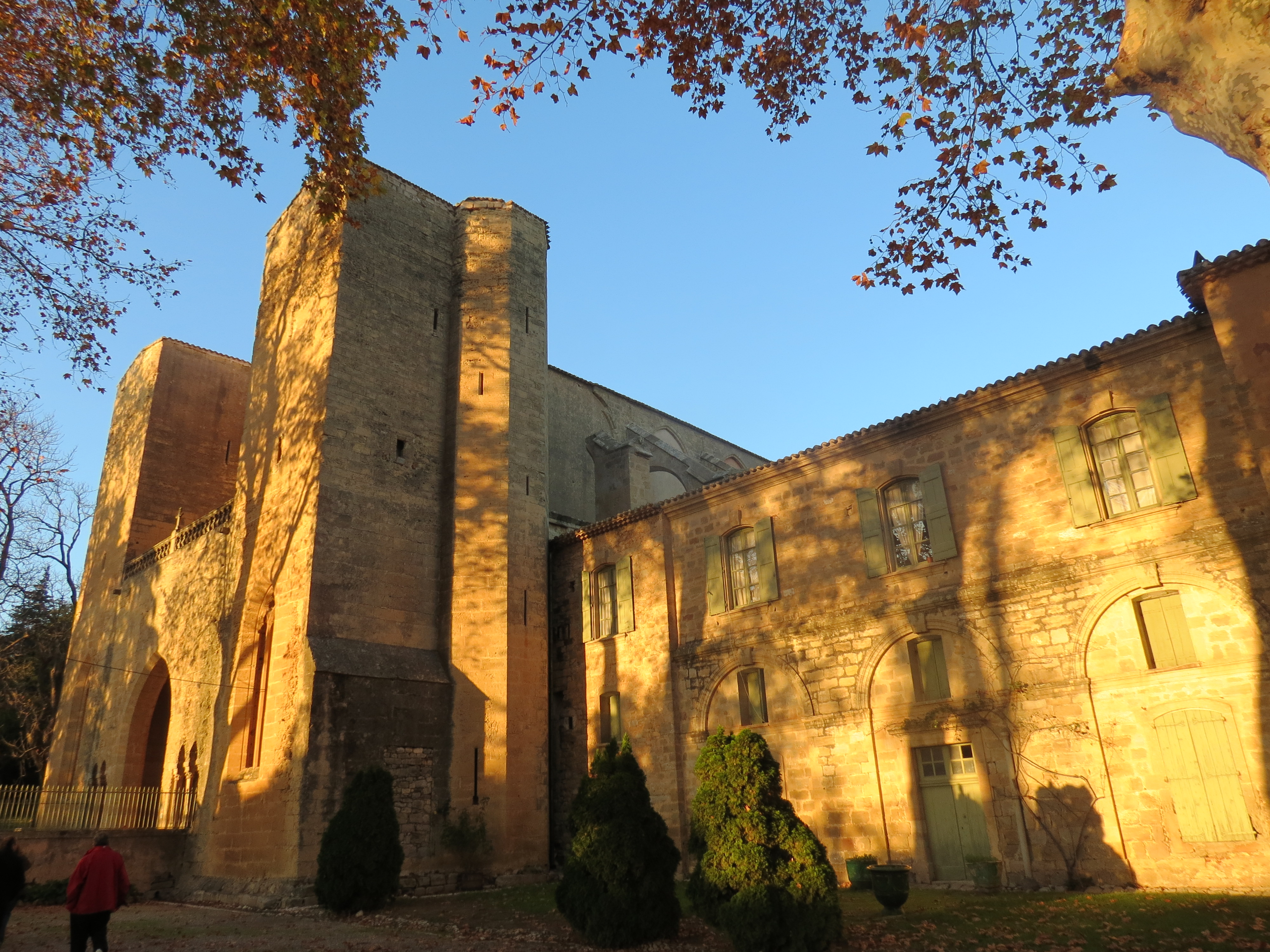 Vue de la façade et portail ouest de l'abbatiale